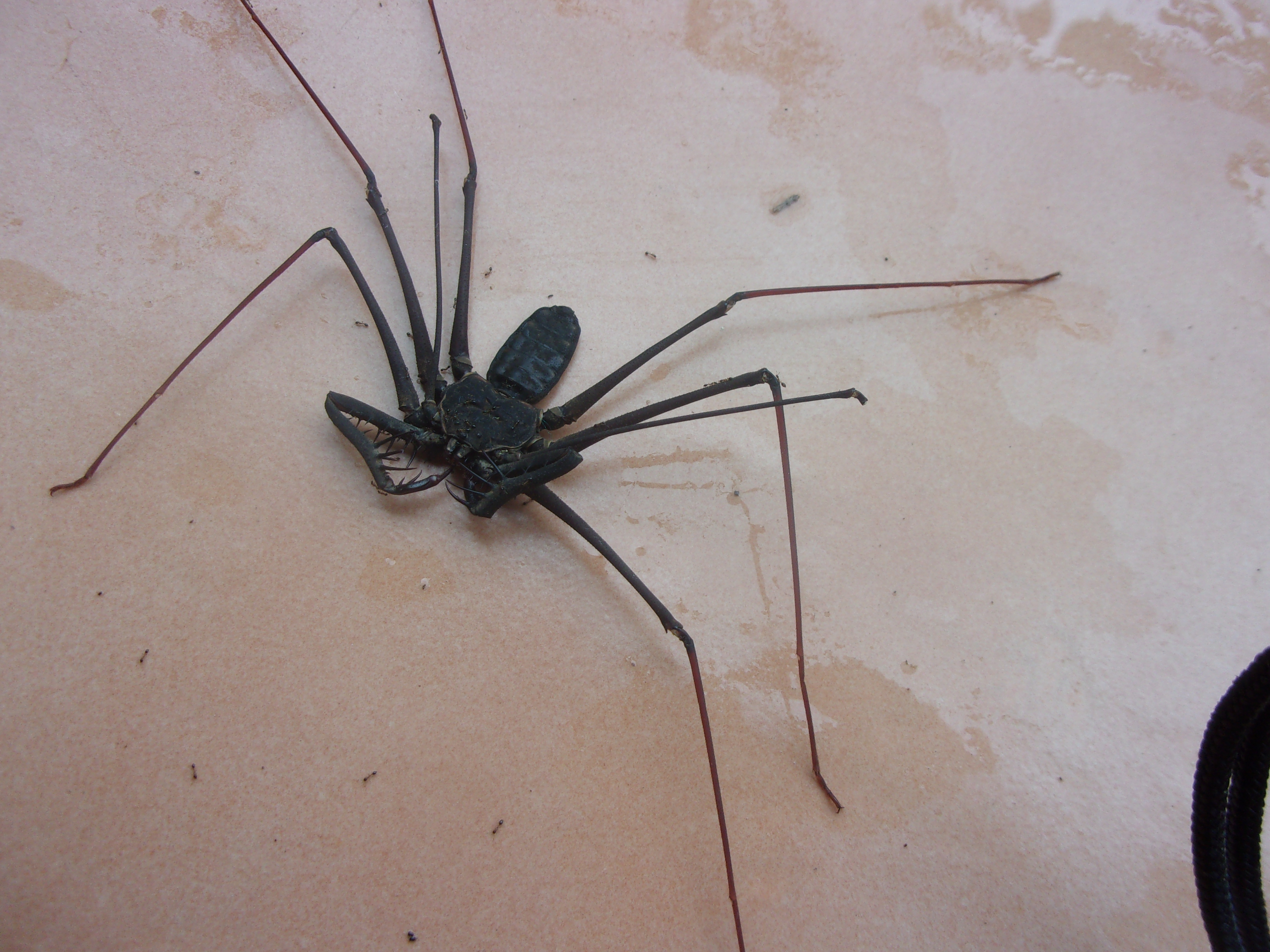 Une drôle de bestiole, il s'agit deHeterophrynus alces.